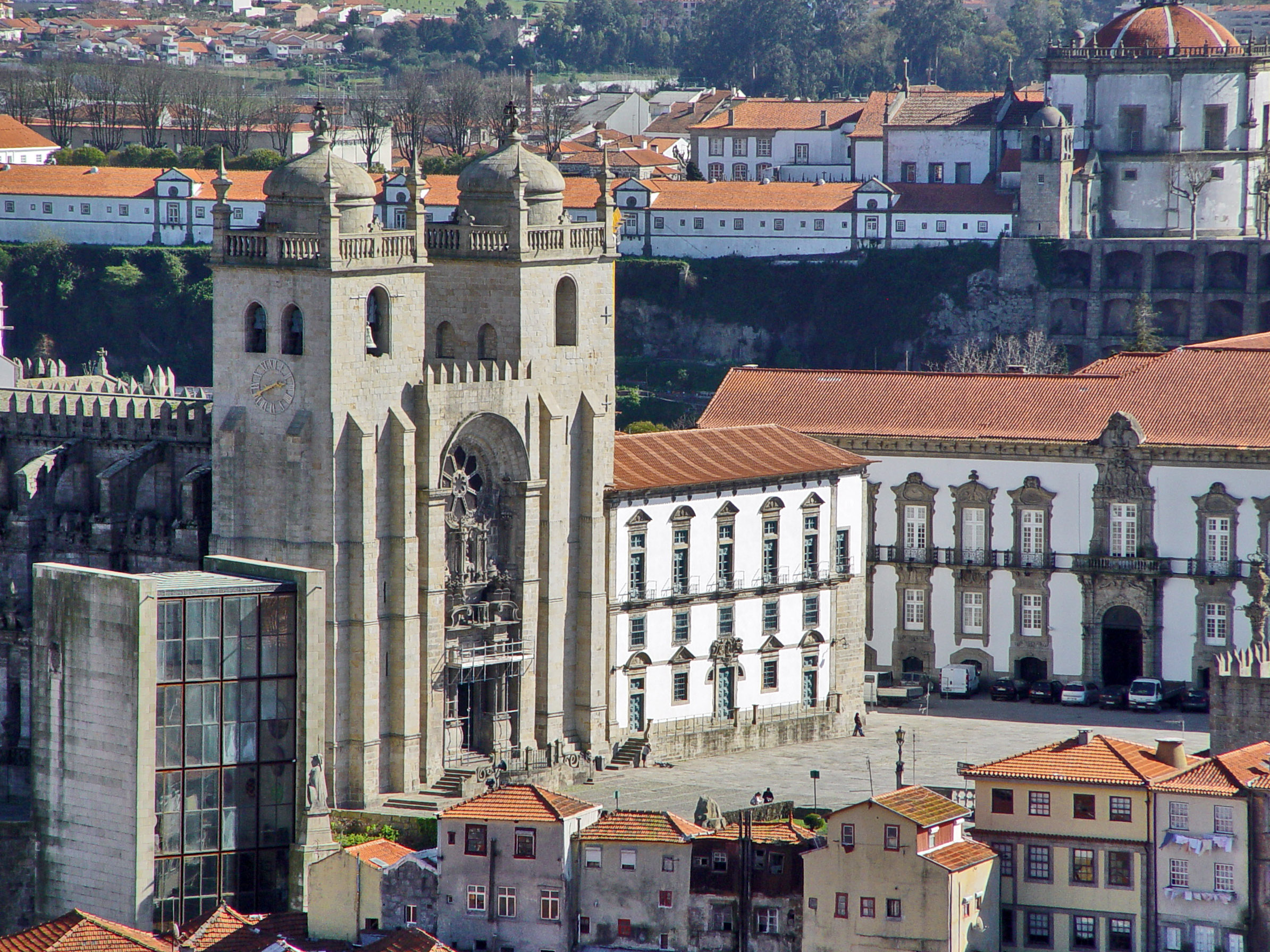 Sé Catedral do Porto ou Sé do Porto This file was uploaded for Wiki Loves Monuments in Portugal with the unique identifier 70397.